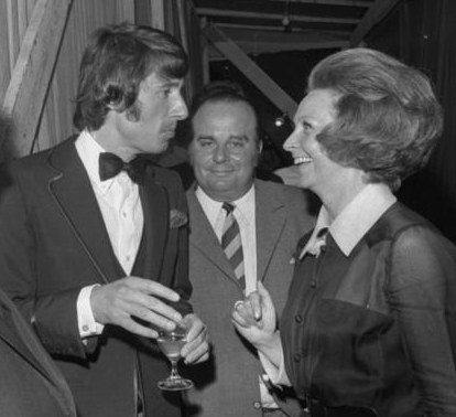 Title: Kanzleramt, Sommerfest, Udo Jürgens, Rut Brandt Extra information: Bonn, Palais Schaumburg.- Sommerfest des Bundeskanzlers.- Udo Jürgens im Gespräch mit Rut Brandt im Hintergrund Karl Wienand People in the image: Jürgens, Udo: Schlagersänger, Österreich (GND 118558641) Brandt, Rut: Autorin, Norwegen (GND 119060078) Wienand, Karl: Politiker, Spion, Deutschland (GND 119299925) Factual corrections and alternative descriptions are encouraged separately from the original description. Additionally errors can be reported at this page to inform the Bundesarchiv. Original historic description: Sommerfest des Bundeskanzlers im Park des Palais Schaumburg